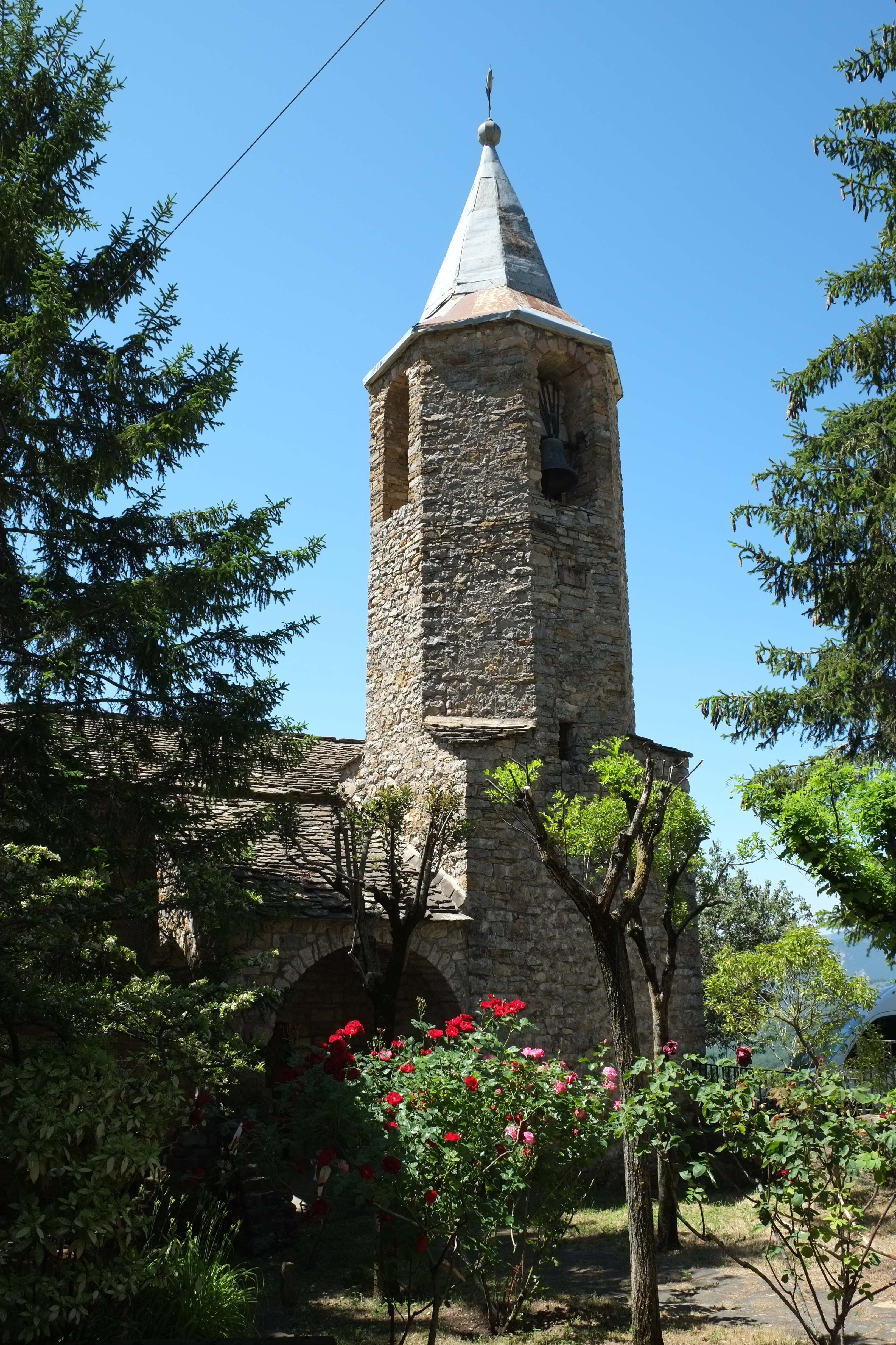 Kirche San Andrés in Calvera in Aragonien (Spanien)